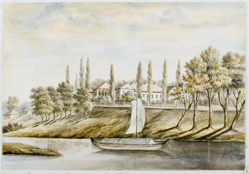 Беларуская (тарашкевіца): Шчэчыцы (Ščečycy), маёнтак Яблонаў (Jabłonaŭ). Сядзіба Ябланоўскіх (Jabłanoŭski)